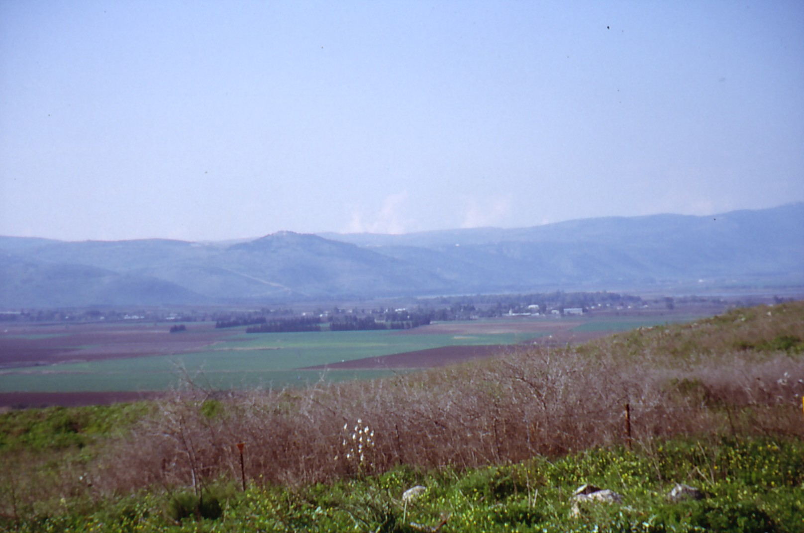 Hula Valley in Northern Israel seen from the Golan Heights Blick von den Golanhöhen auf die Huleebene (Nordisrael)